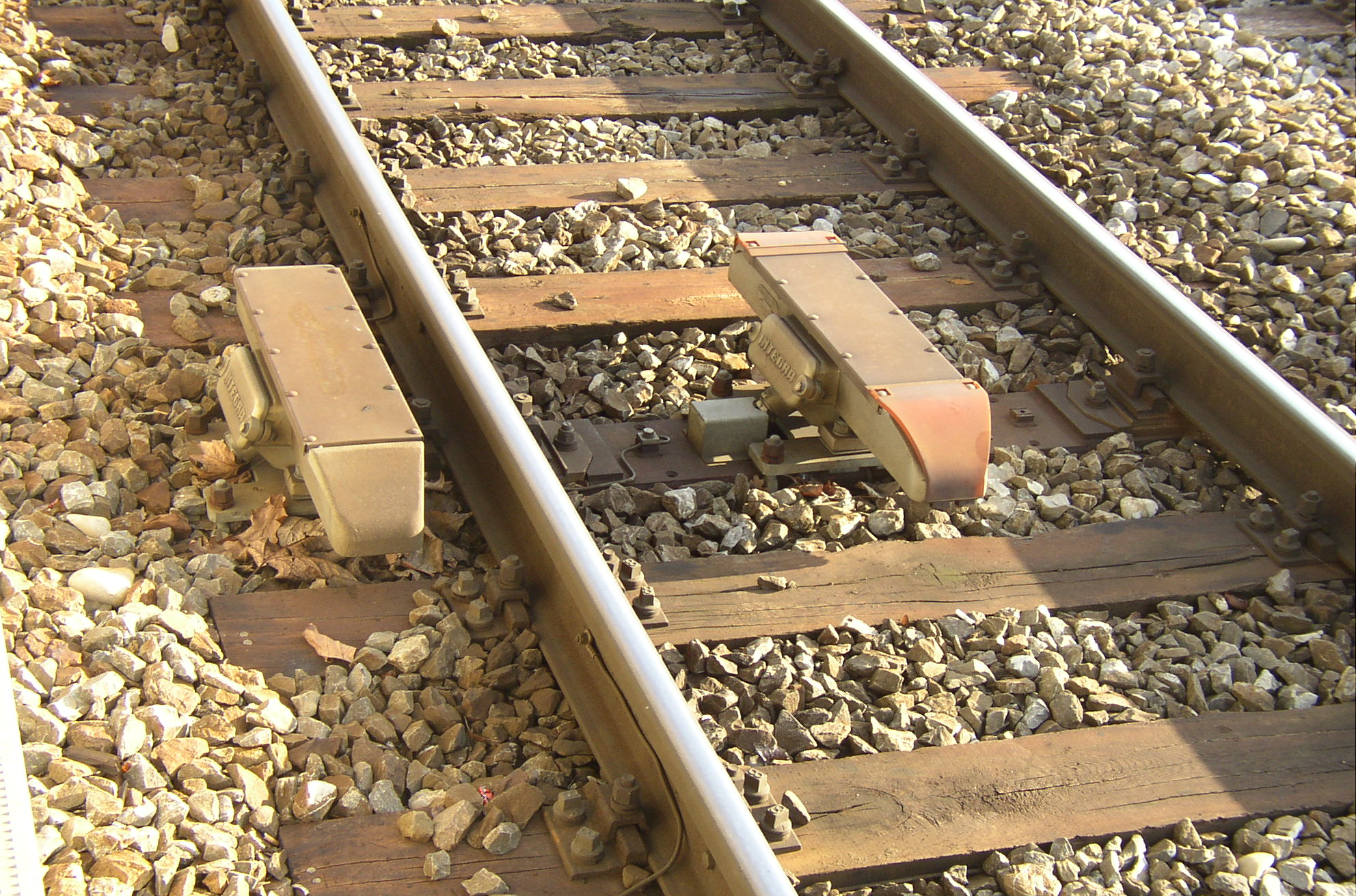 Integra-Signum Gleismagnet.